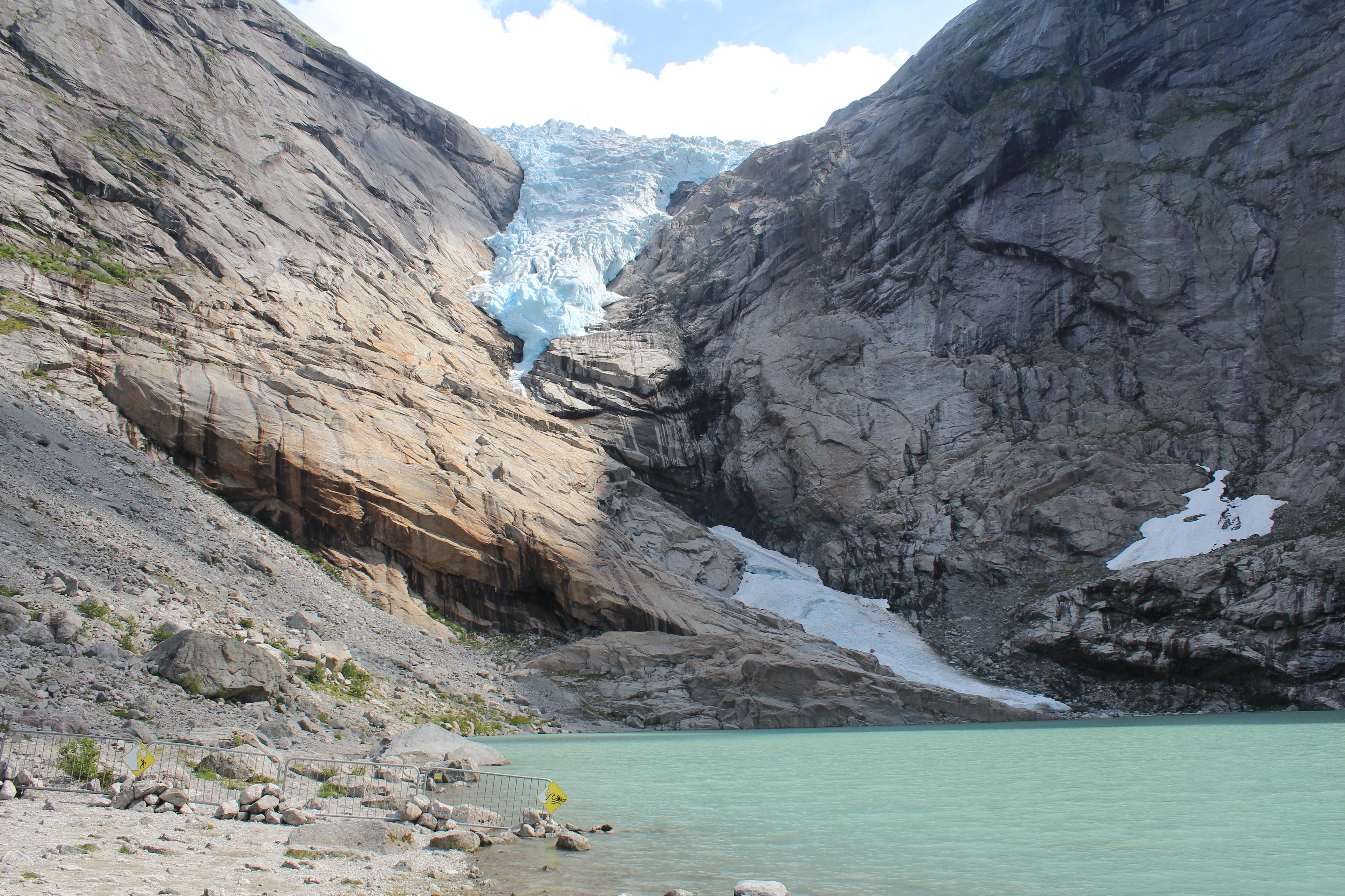 Briksdalbreeen 2018